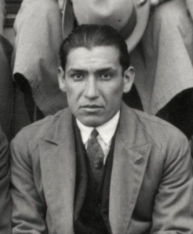 Ernesto Chaparro in 1928